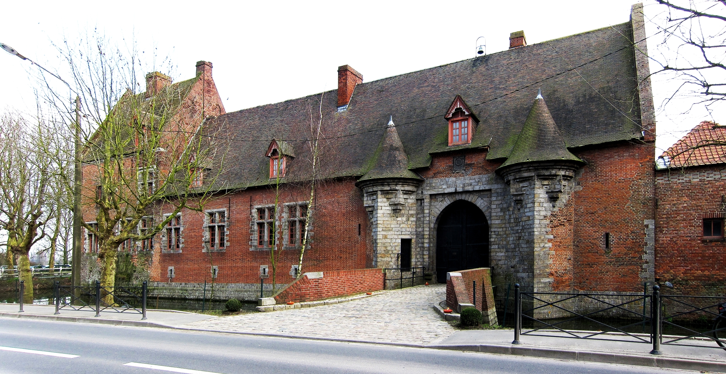 La ferme des Templiers à Verlinghem (Nord).